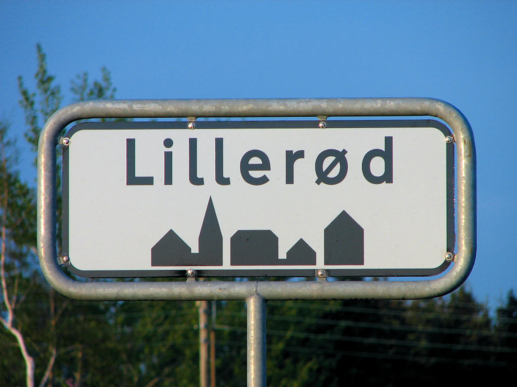 Lillerød byskilt